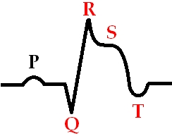 Острая стадия инфаркта миокарда